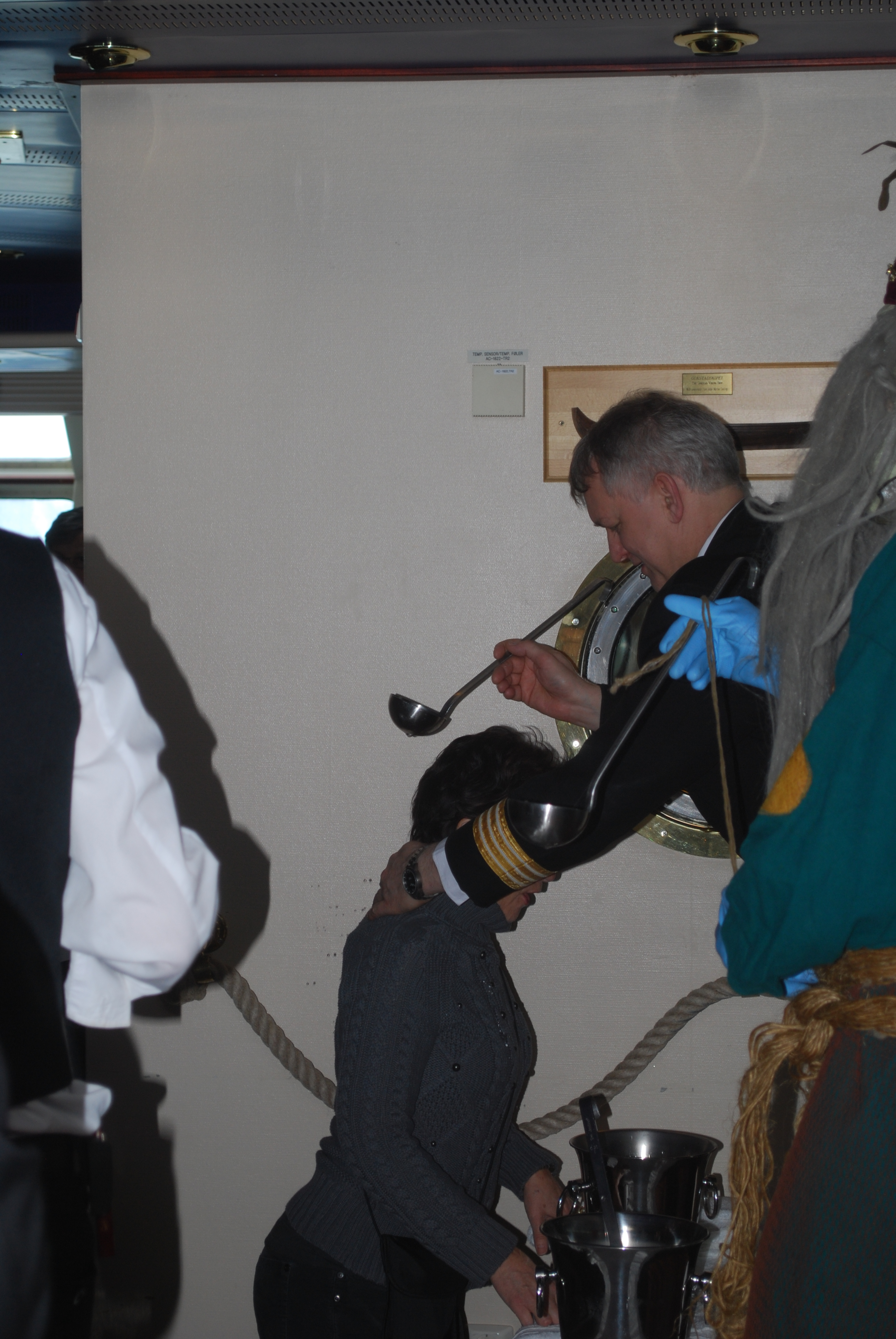 Polarkreistaufe an Bord der MS Nordnorge. Dem „Täufling“ wird Eiswasser in den Hals gekippt. Die Figur rechts mit dem langen Bart ist Neptun.